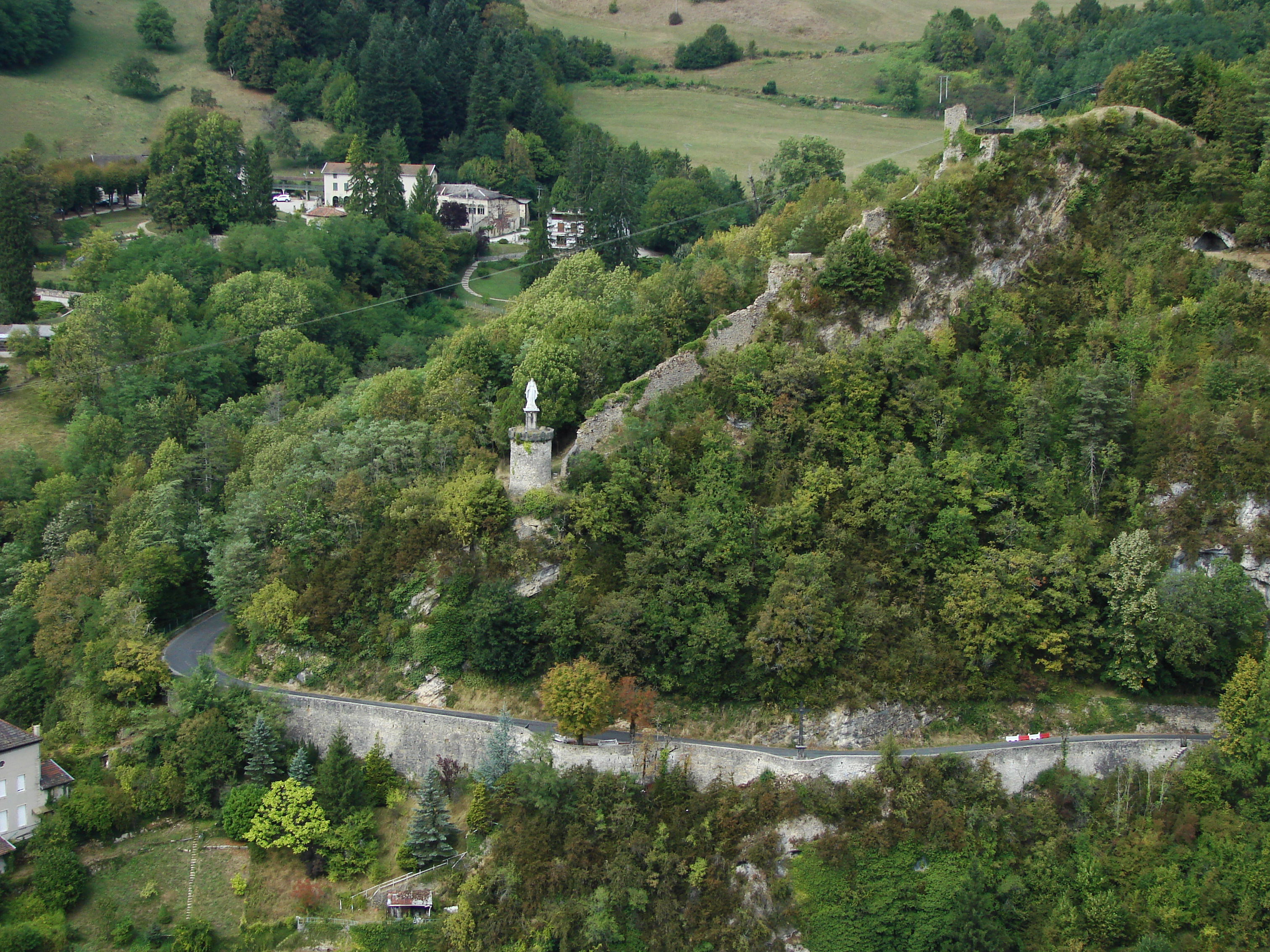 Ruine du Château de Cornillon de Saint-Rambert-en-Bugey